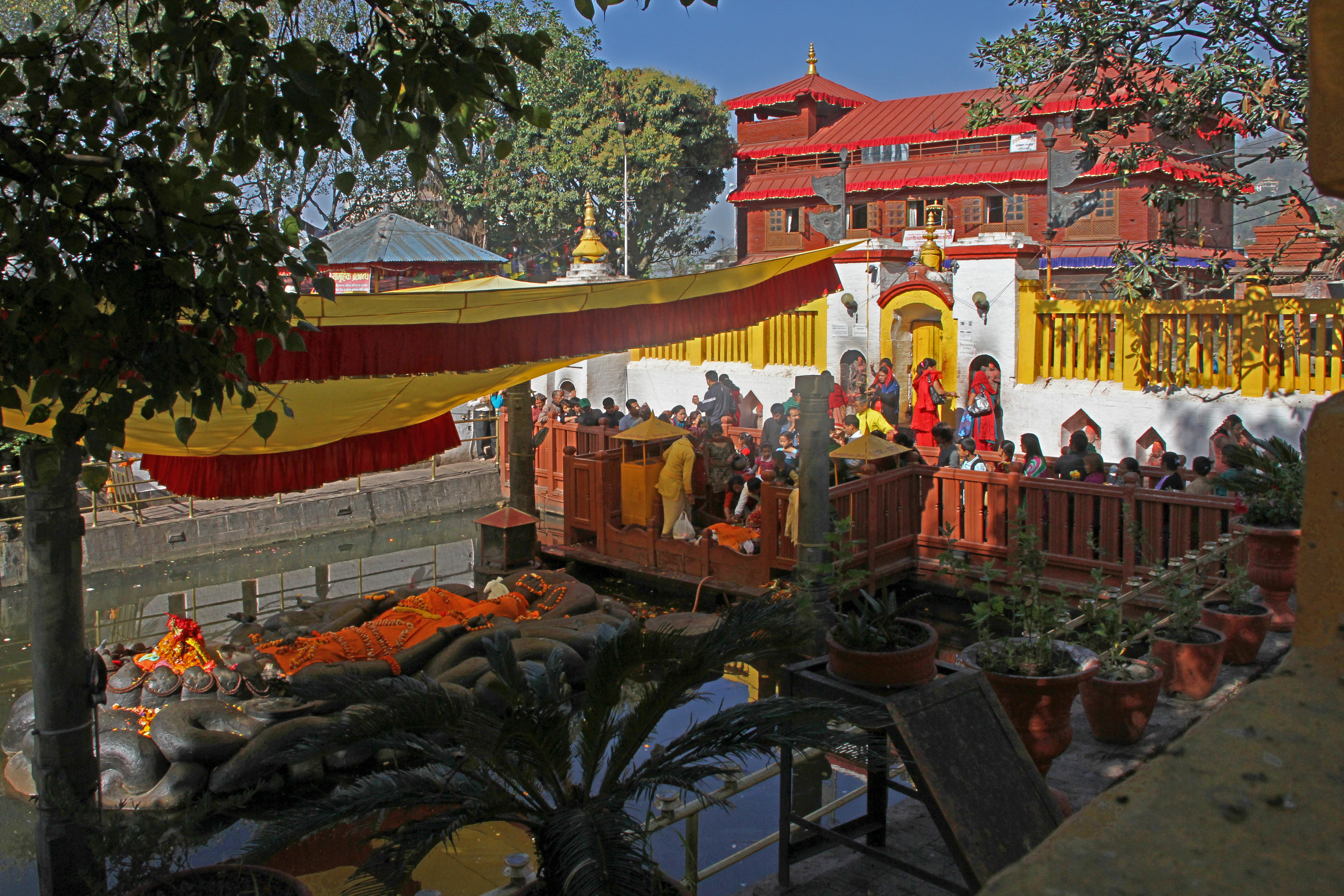 Budhanilkantha, Fest zu Ehren Vishnus